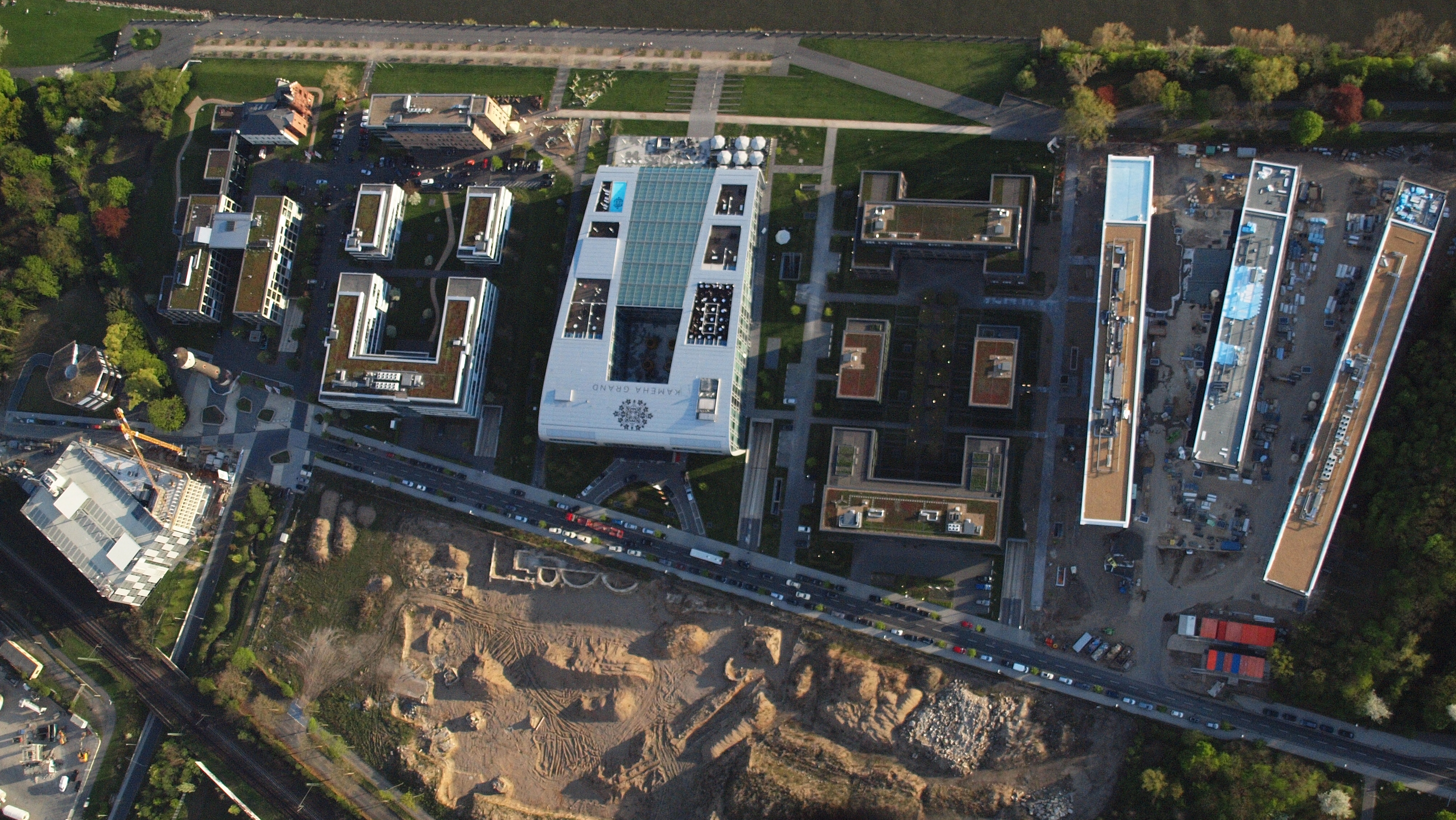 Bonner Bogen: Senkrechtaufnahme